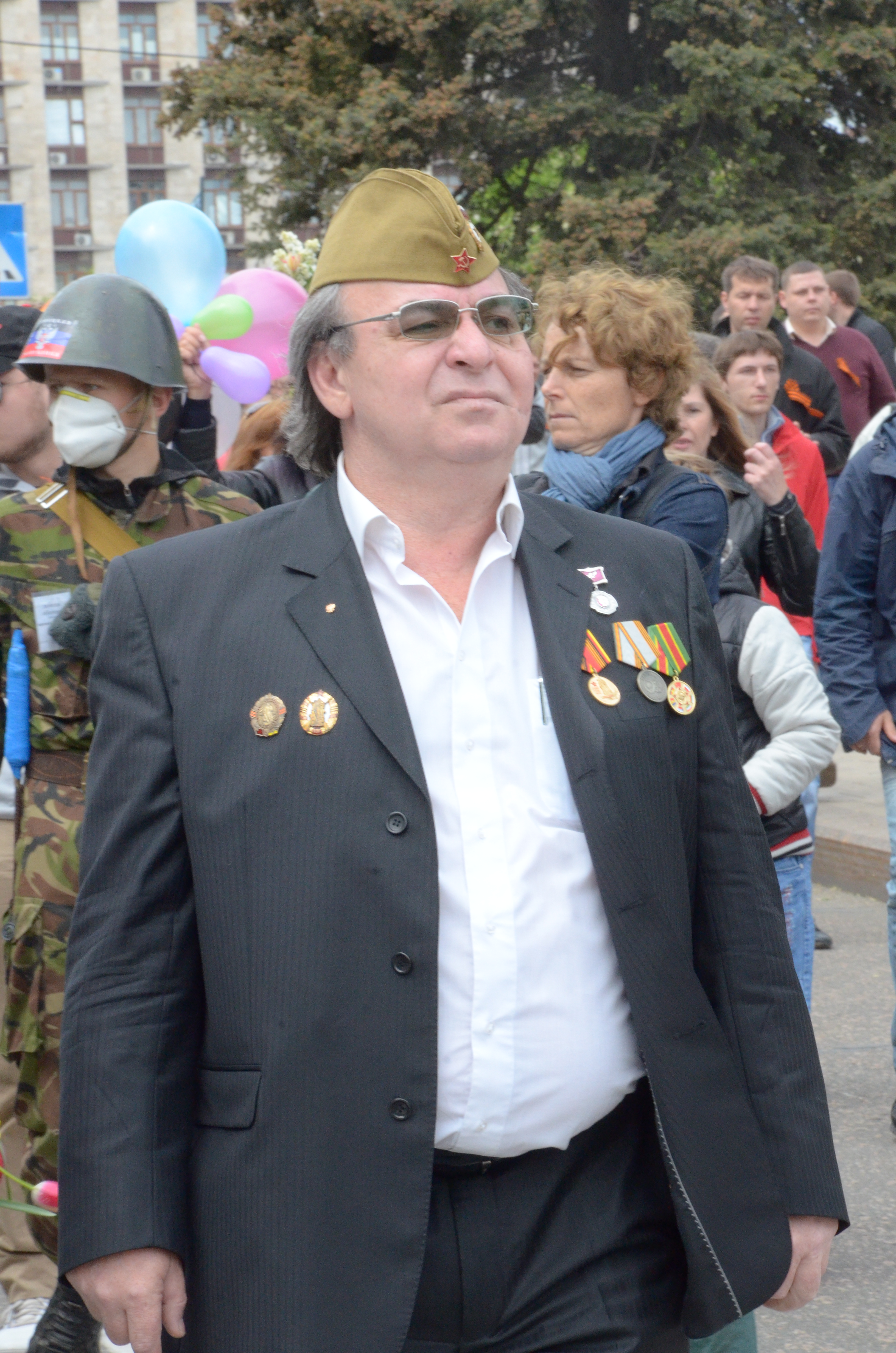 День Победы в Донецке